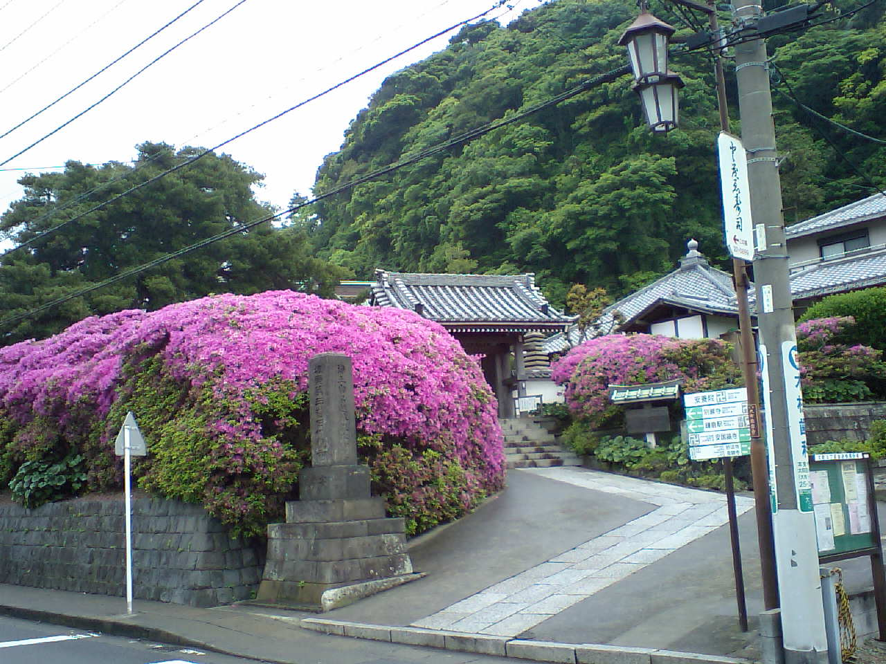 annyoin temple in Kamakura Japan